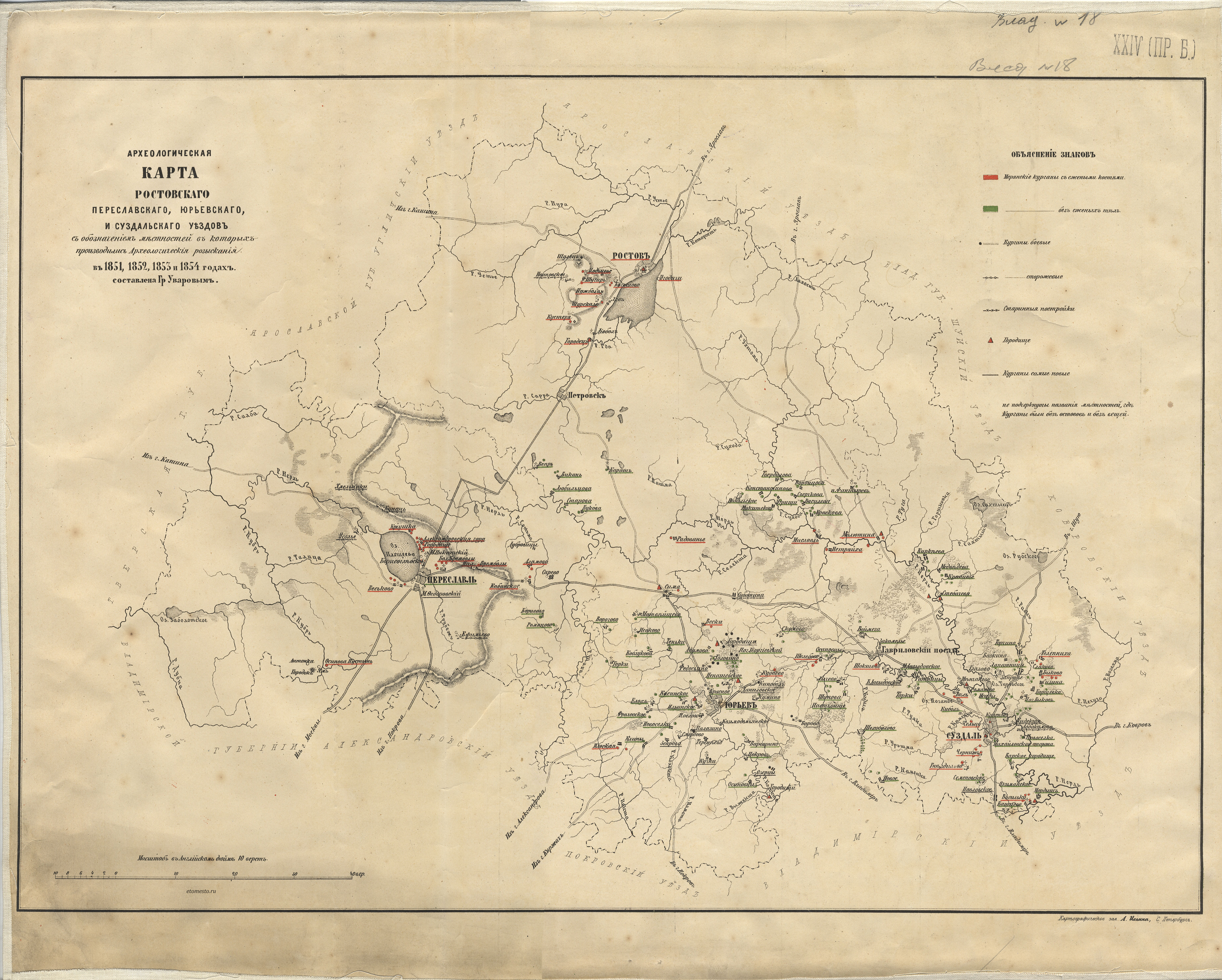 Археологическая карта Ростовского, Переславского, Юрьевского, и Суздальского уездов с обозначением местностей в которых производились Археологические разыскания в 1851, 1852, 1853 и 1854 годах